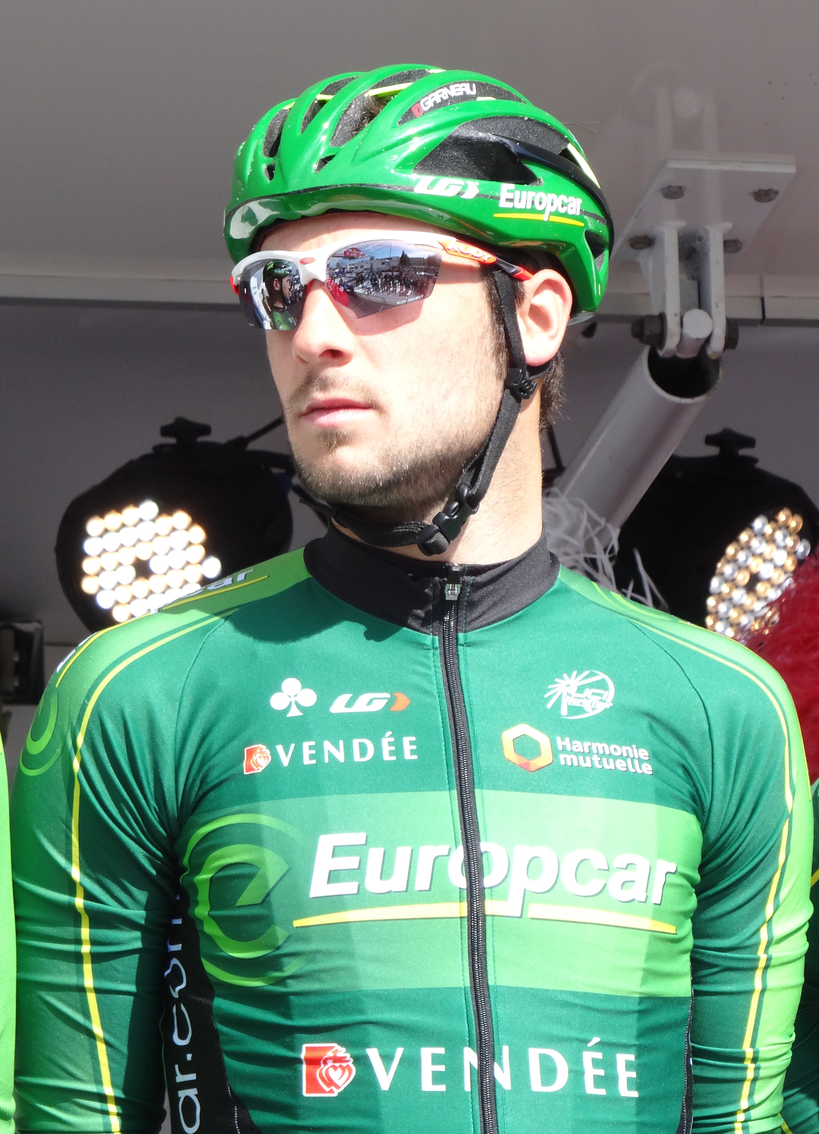 Reportage réalisé le jeudi 17 avril à l'occasion du départ et de l'arrivée du Grand Prix de Denain 2014 à Denain, Nord, Nord-Pas-de-Calais, France.